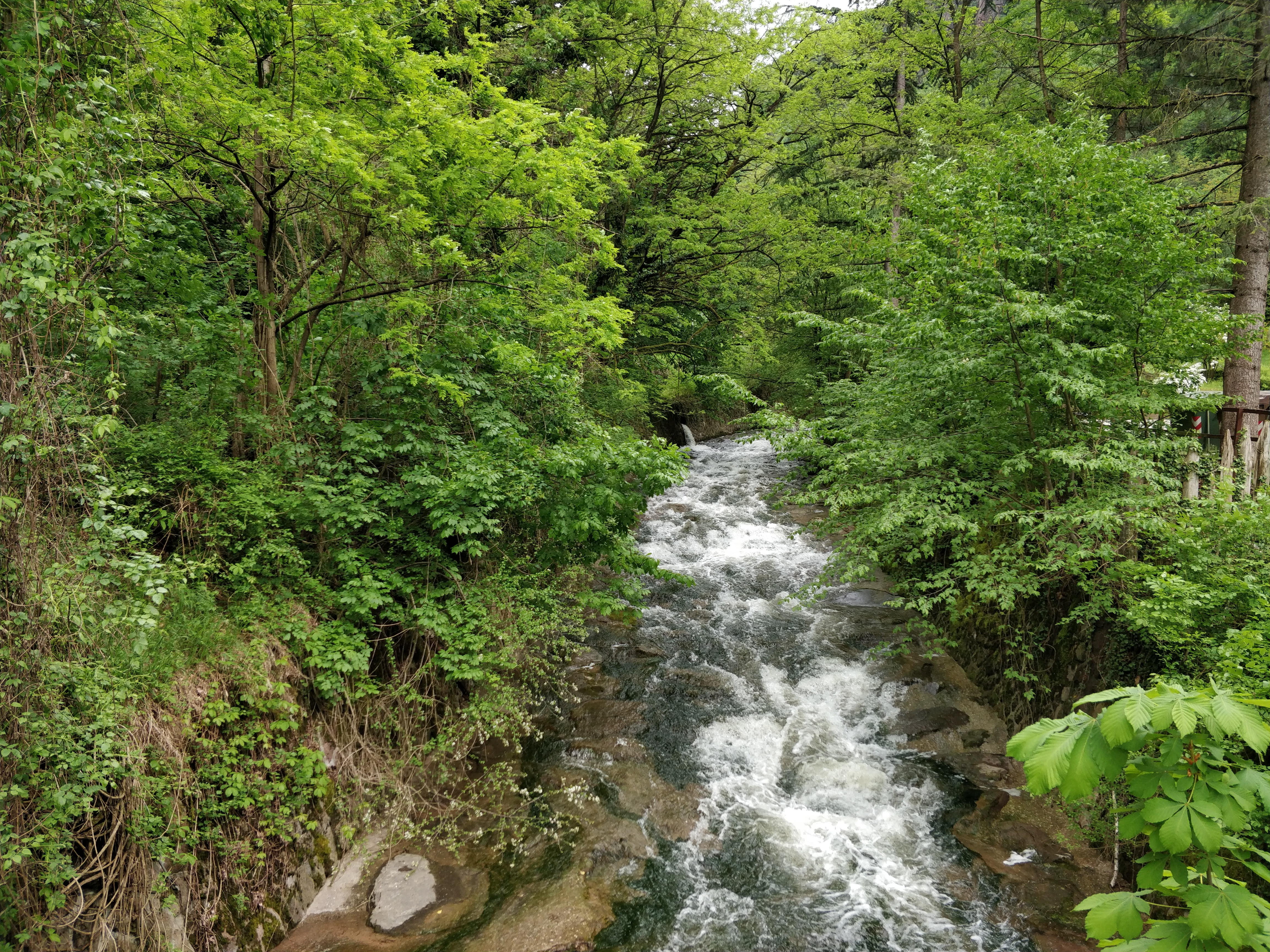 fiume